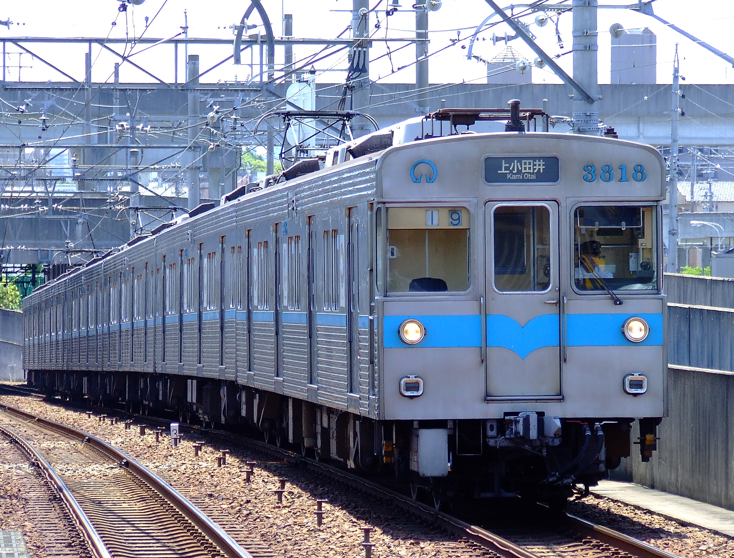 名古屋市営地下鉄鶴舞線3000形電車 上小田井駅にて